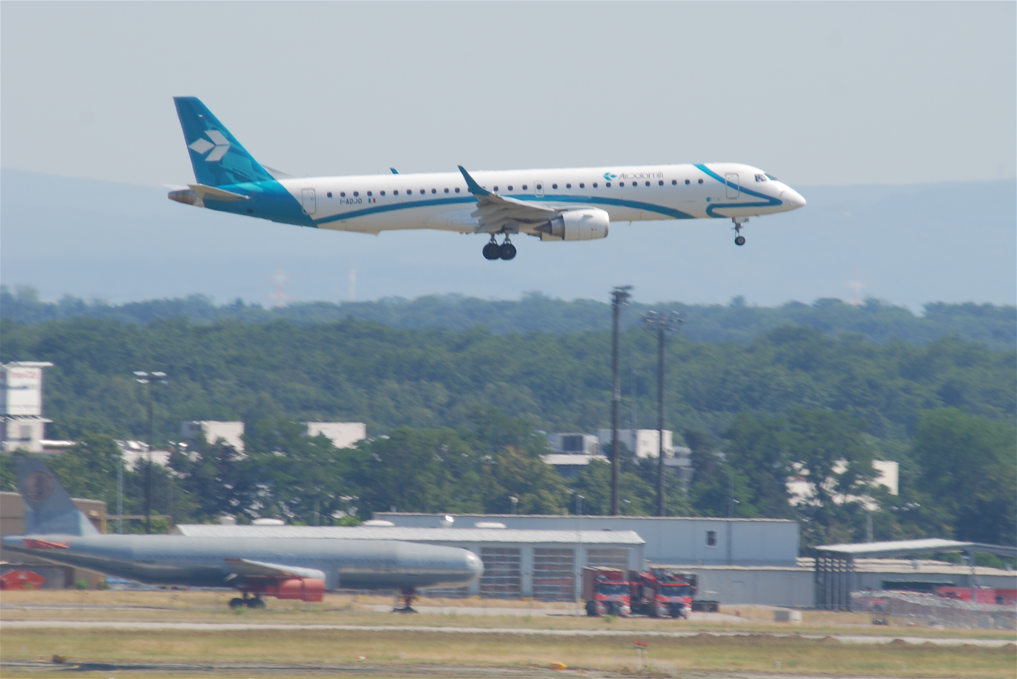 Air Dolomiti Embraer ERJ-190; I-ADJO@FRA;08.07.2010/580dg